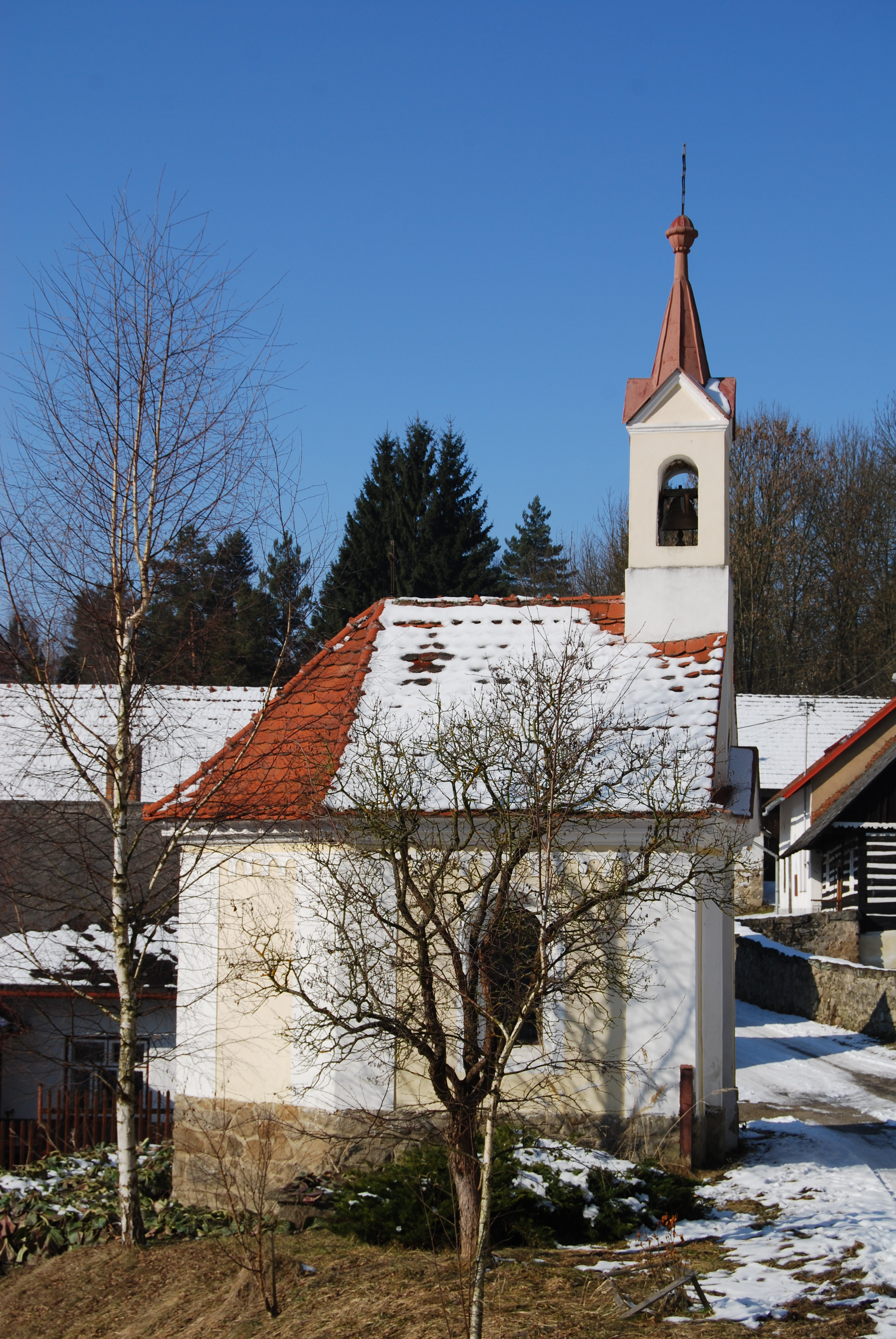 Návesní kaple Panny Marie. Žebrákov (Kovářov). Okres Písek. Česká republika.